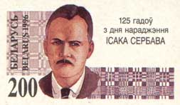 Почтовая марка Белоруссии ко 125-летию рождения Исаака Сербова